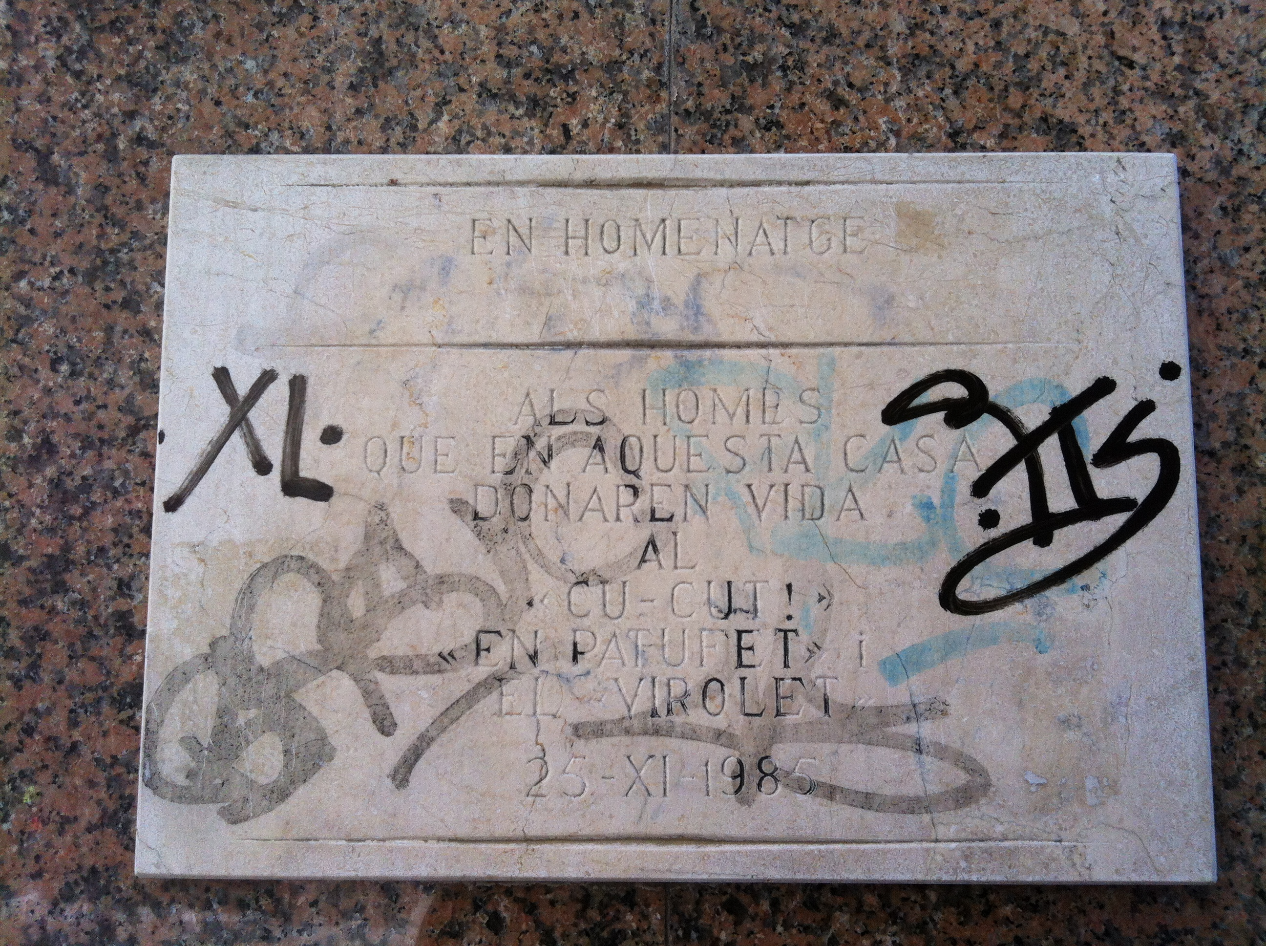 Cu-cut, Patufet i Virolet. C. Cardenal Casañas, 4 (Barcelona)